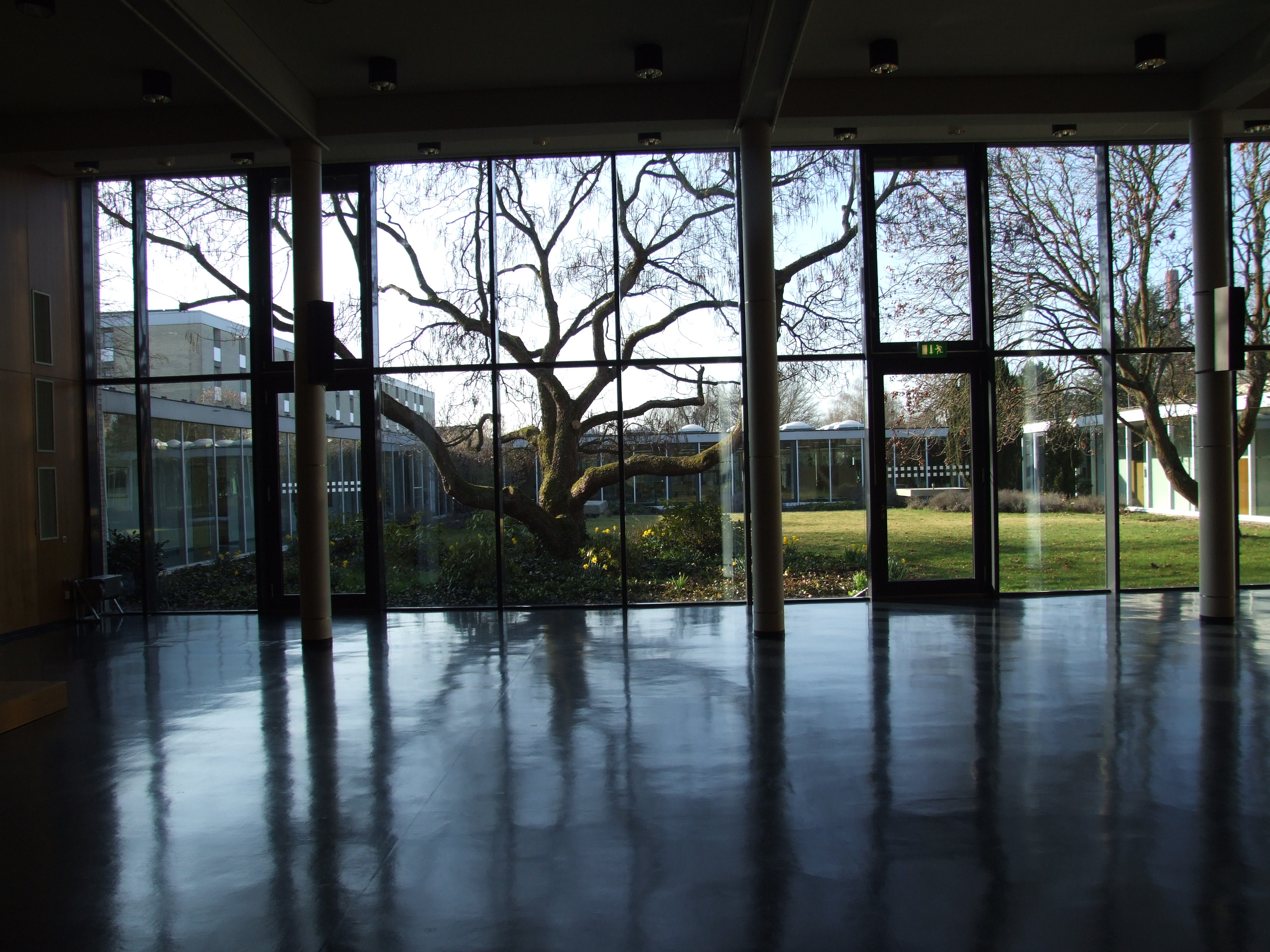 Universität Speyer, Freiherr-vom-Stein-Str. 2; Blick von der Aula auf den Innenhof mit Osterglocken, gegenüber alte Bibliothek, links (südöstlich) Gästehaus Freiherr vom Stein